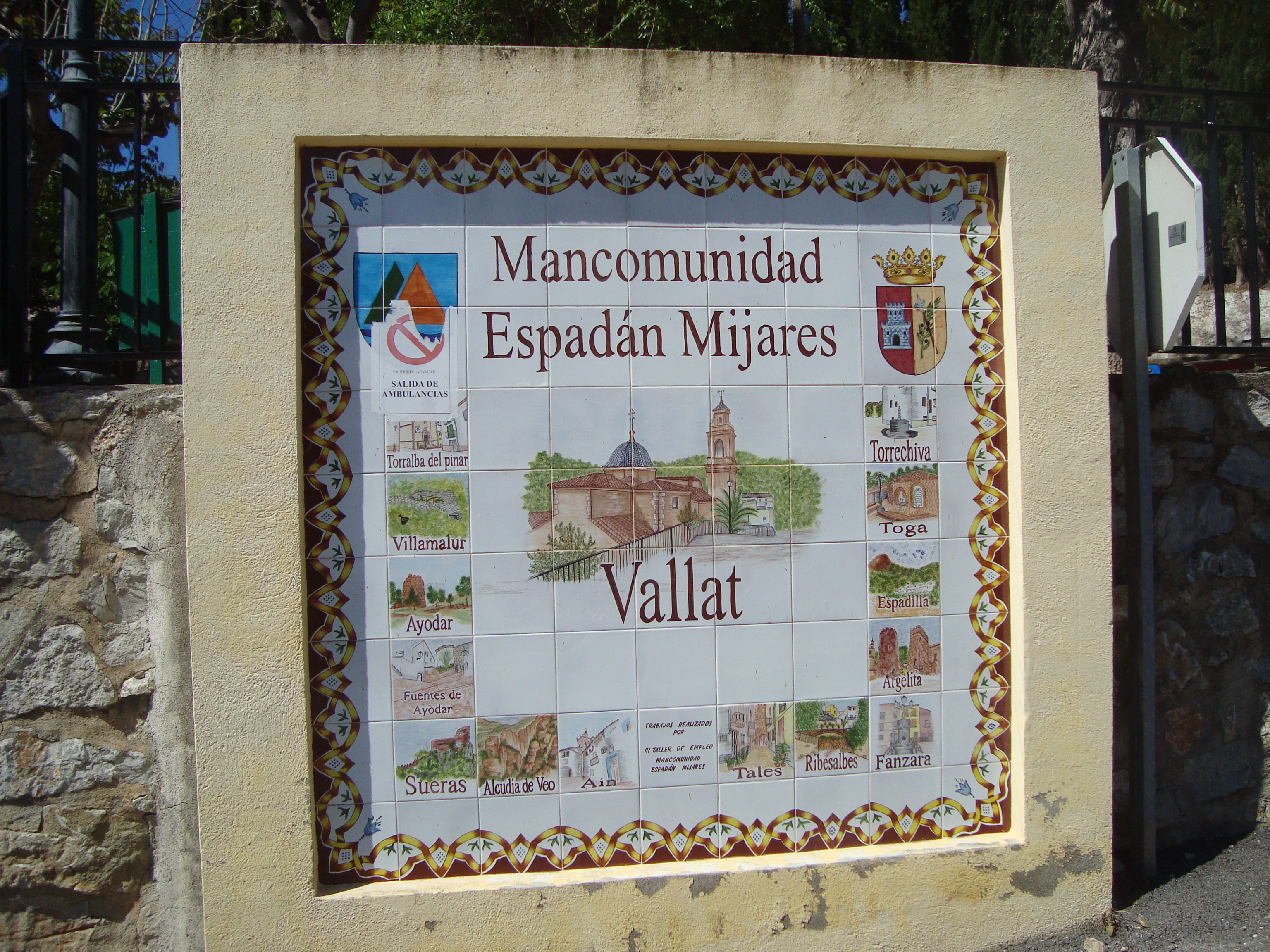 Vallat, mural cerámic, Mancomunidad Espadà-Millars (Castelló)